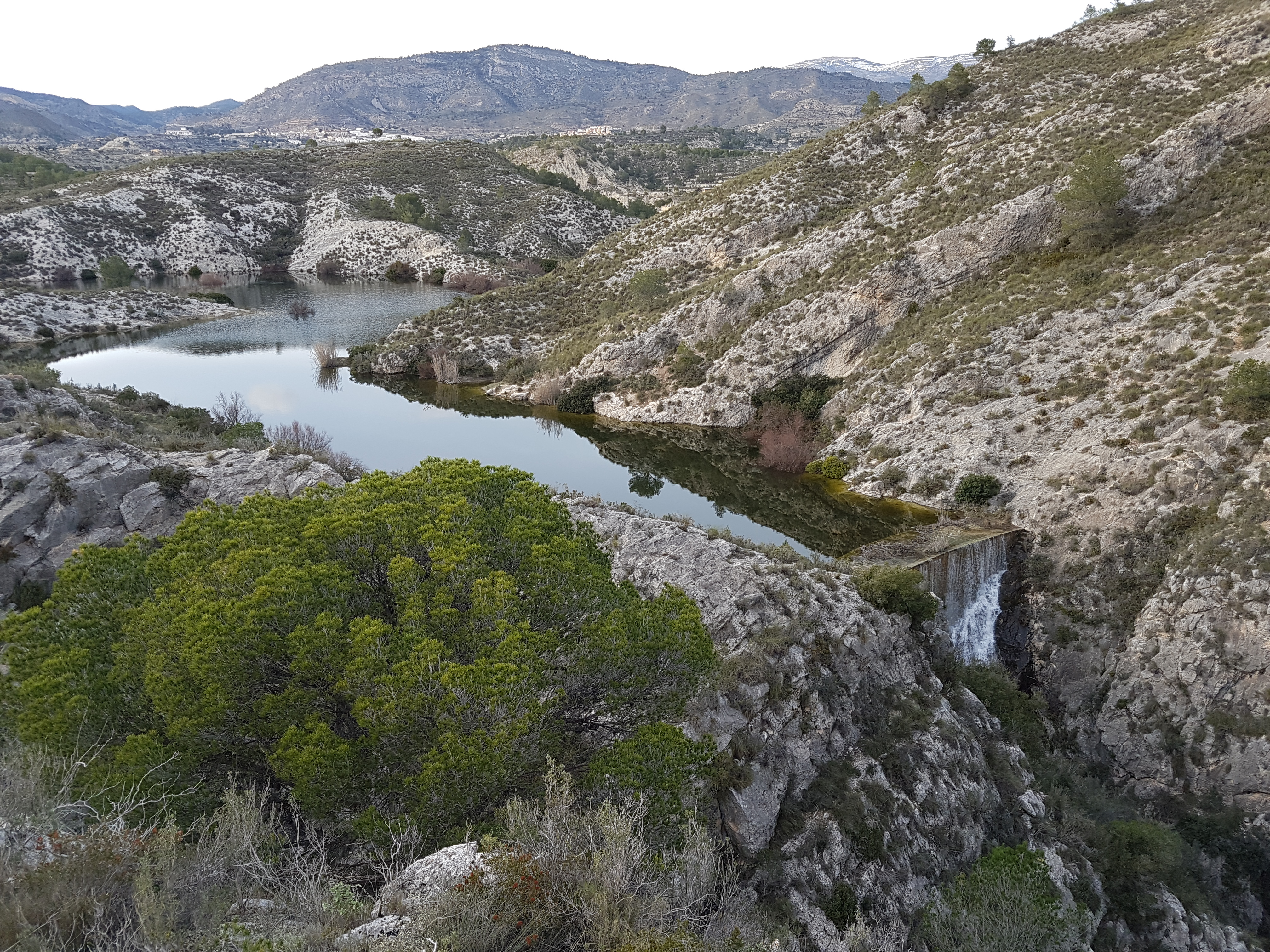 Rio Amadorio en Relleu